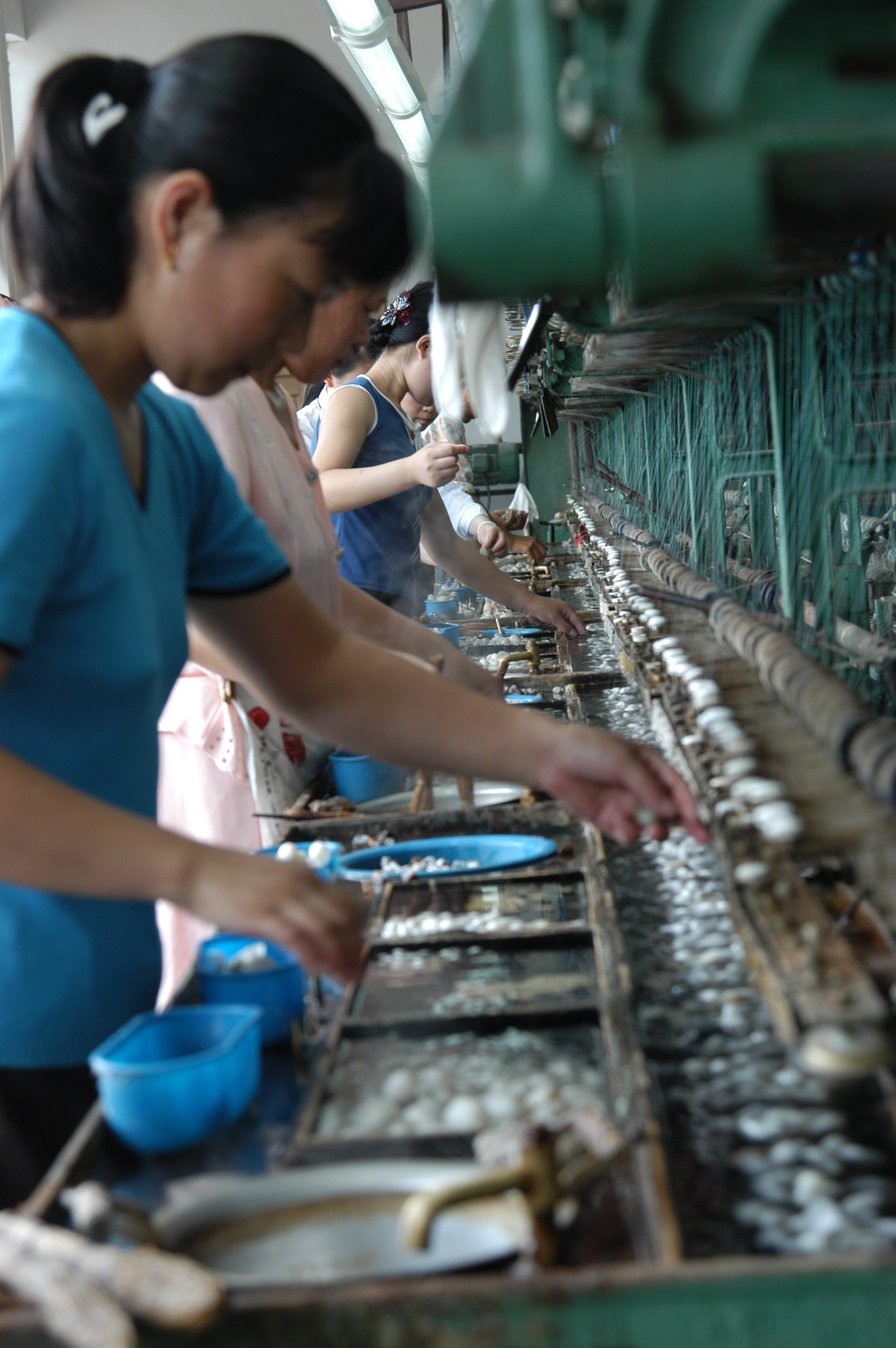 des travailleurs dans un atelier.